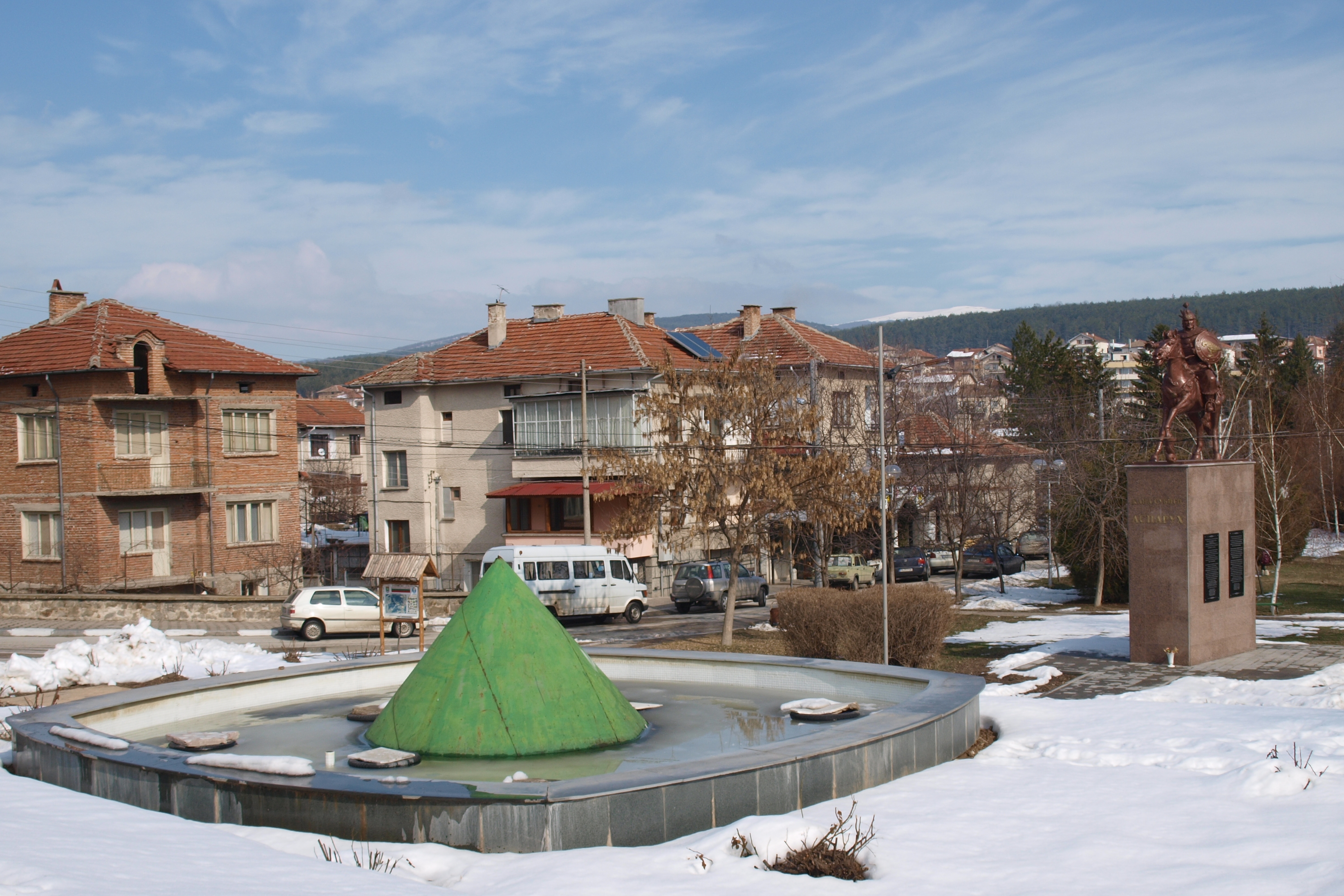 Фонтана и паметника на кан Аспарух в центъра на Стрелча.